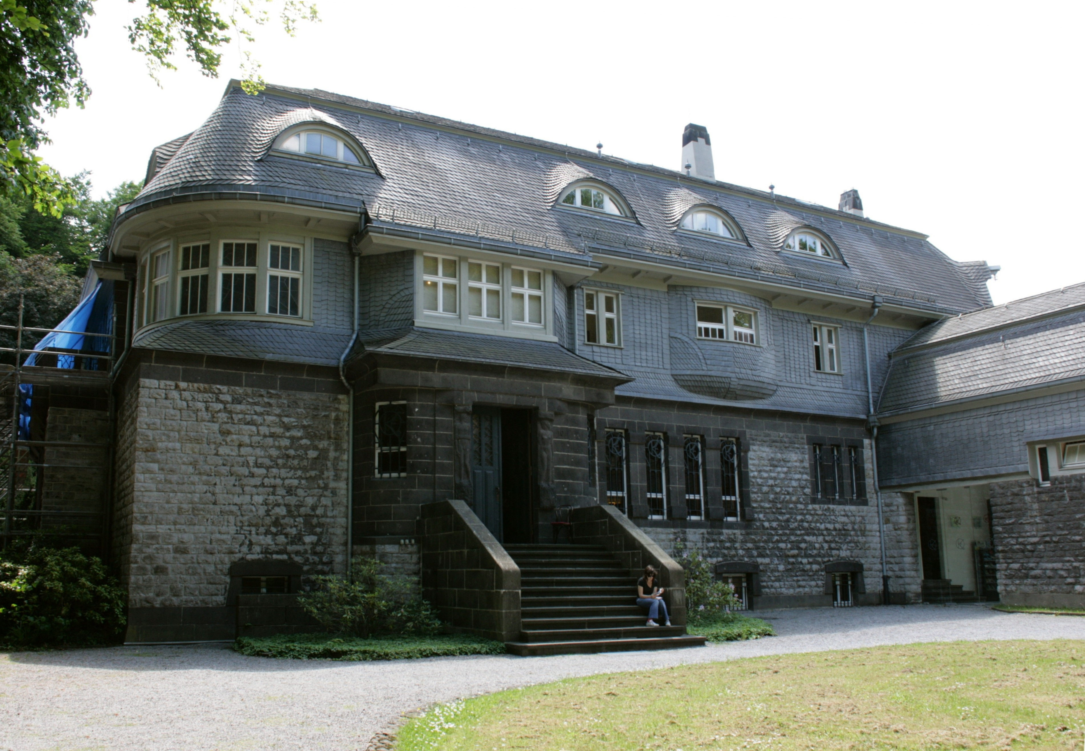 Hohenhof, Stirnband 10 in Hagen